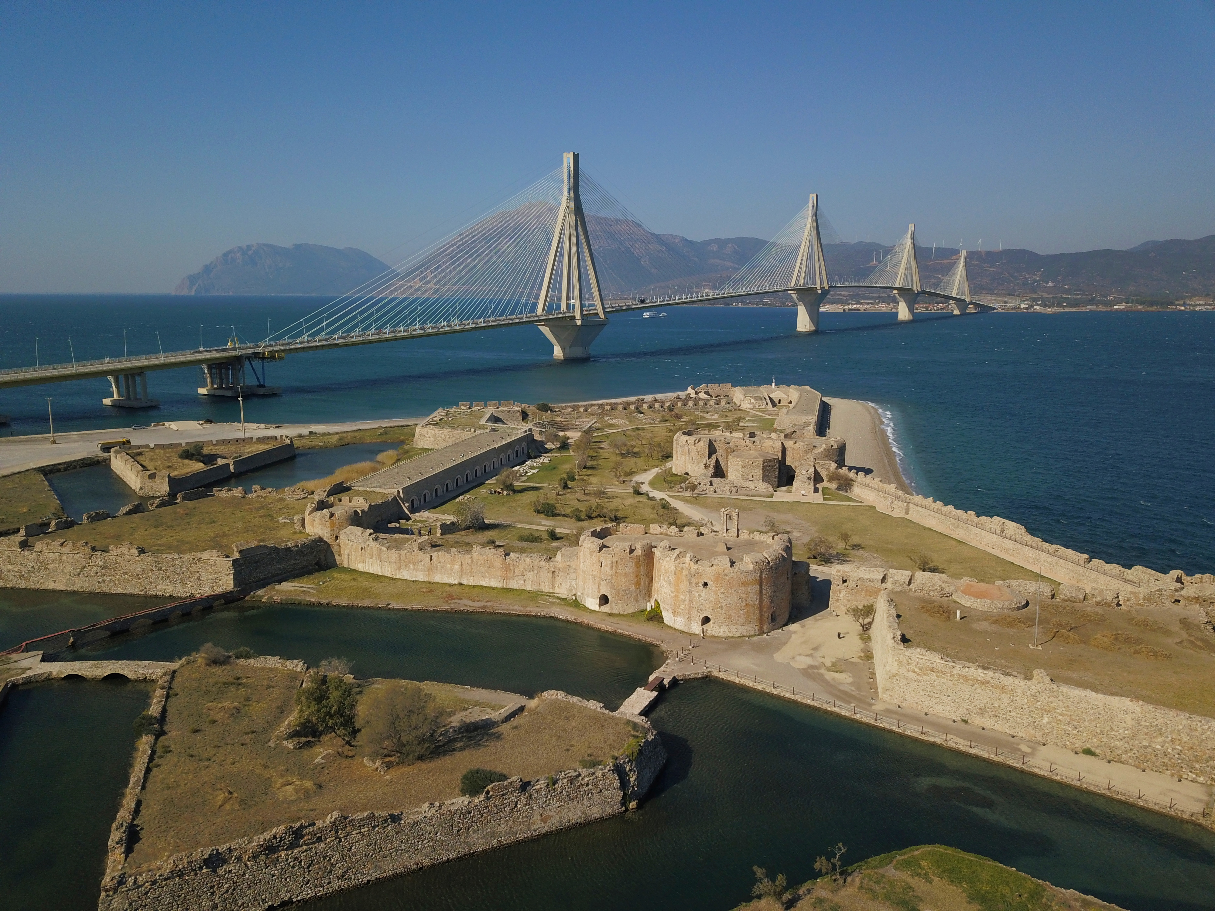 Luftaufnahme der Festung